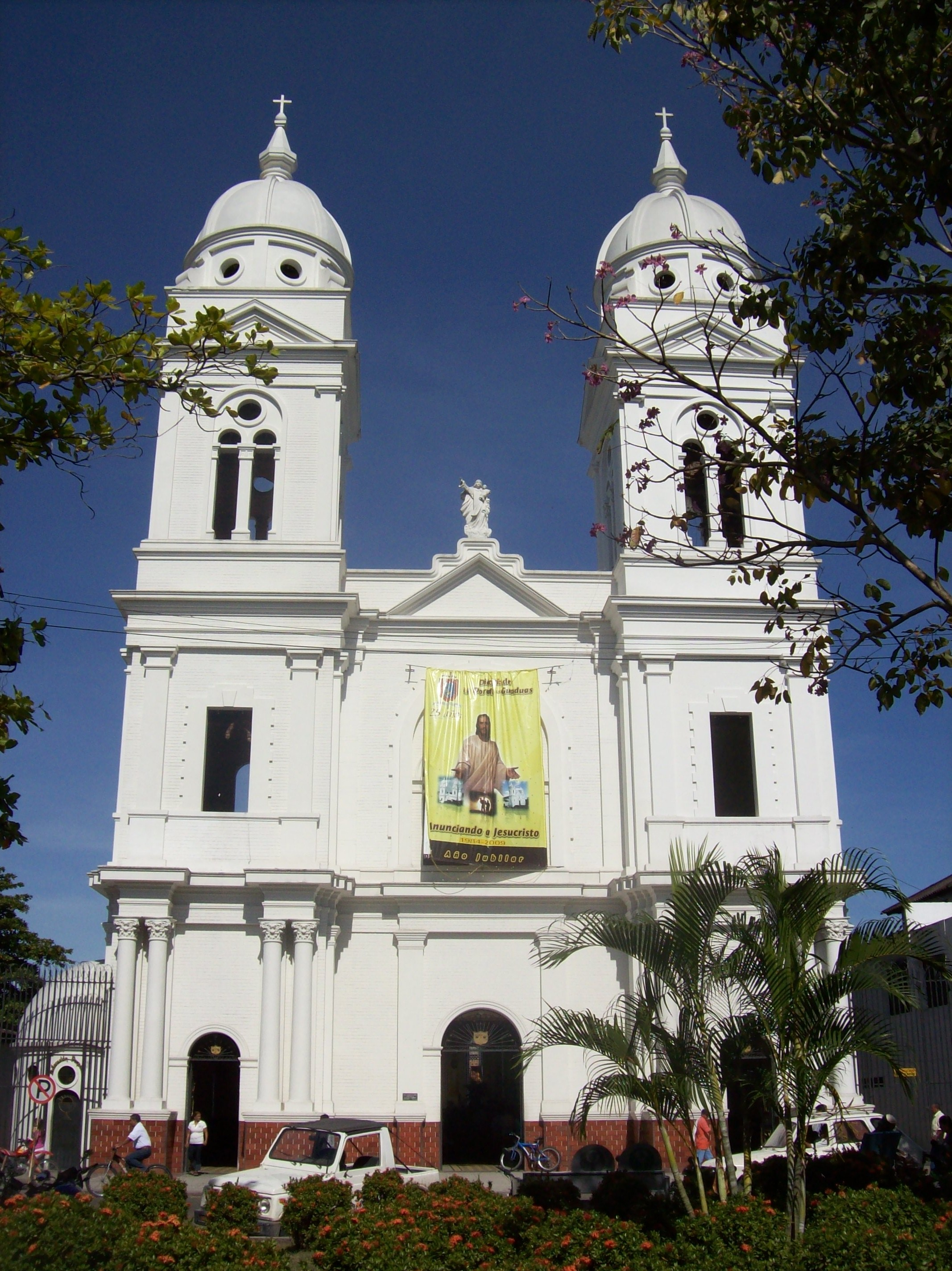 Fachada de la Catedral de Nuestra Señora del Carmen.